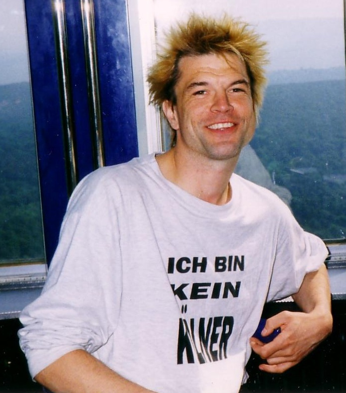 Campino auf dem Fernsehturm in Stuttgart während eines Interviews für den Sender SDR3 die Radio-Live-Sendung „Leute“ am 7.6.1997